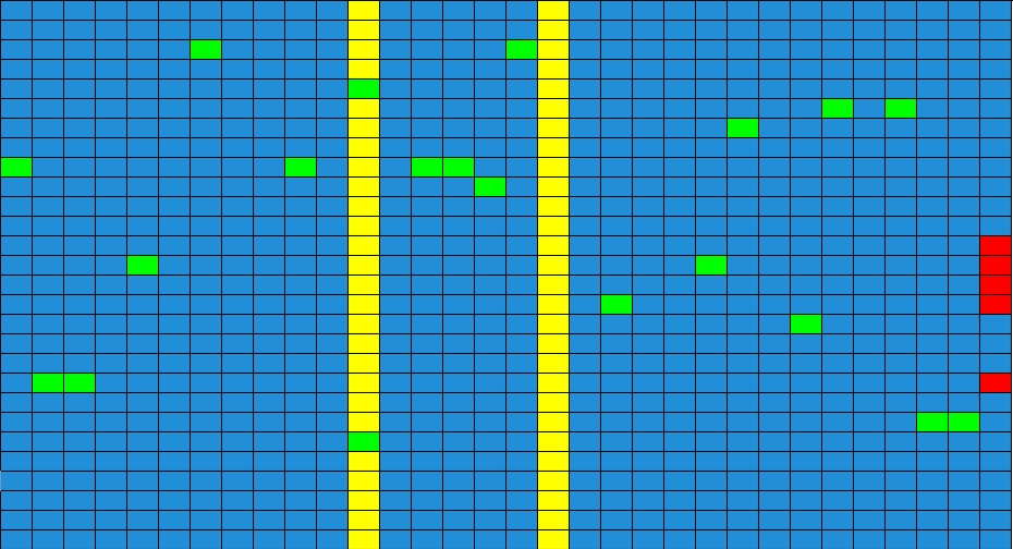 Beispiel CIRC Teil 1